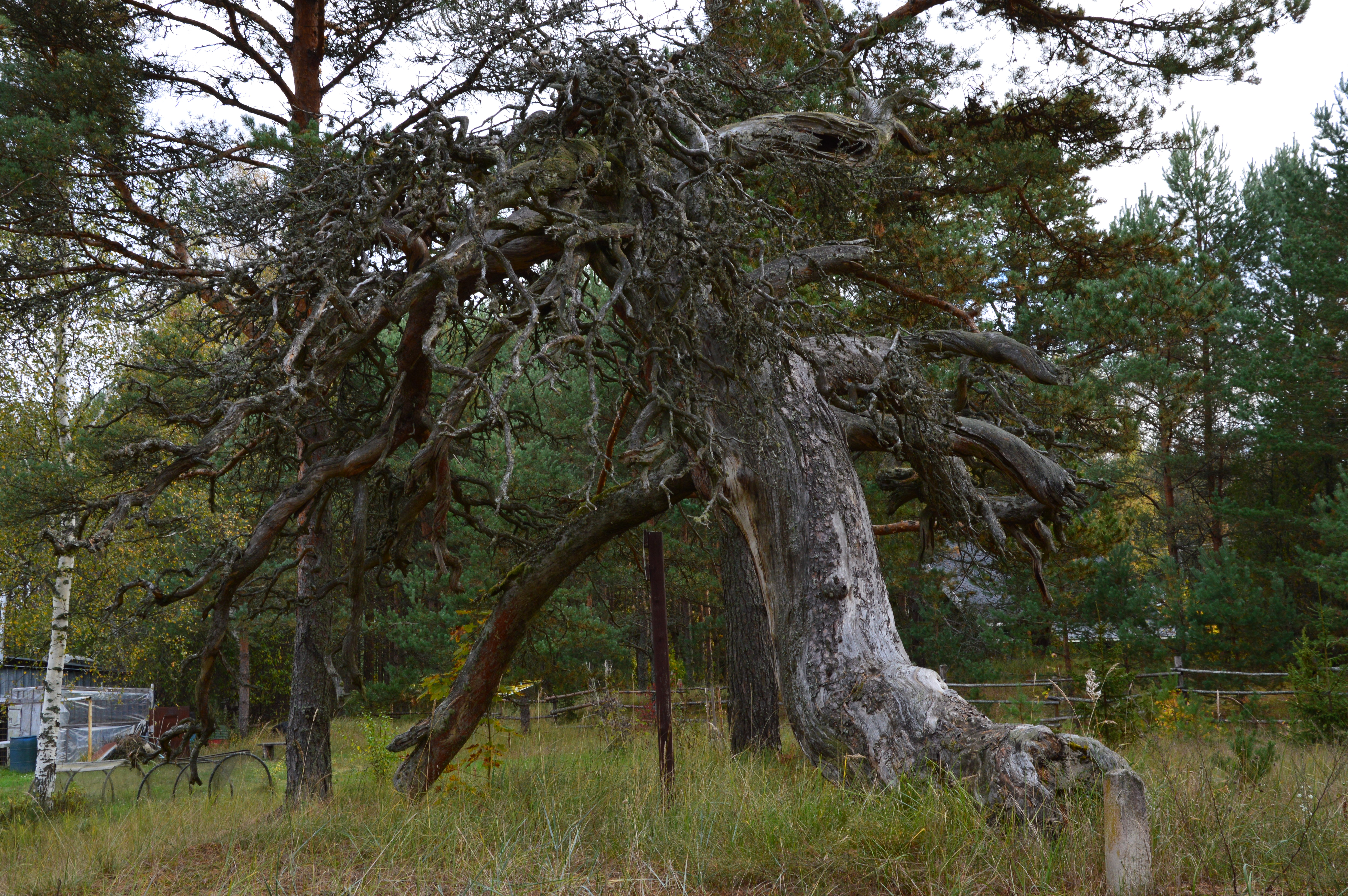 Kuru mänd